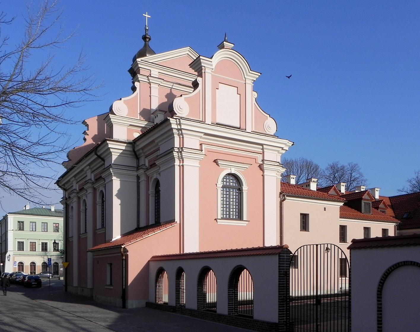 Kościół św. Anny przy zespole klasztornym klarysek - po renowacji. Widok z ulicy Moranda od strony murów bastionu II.